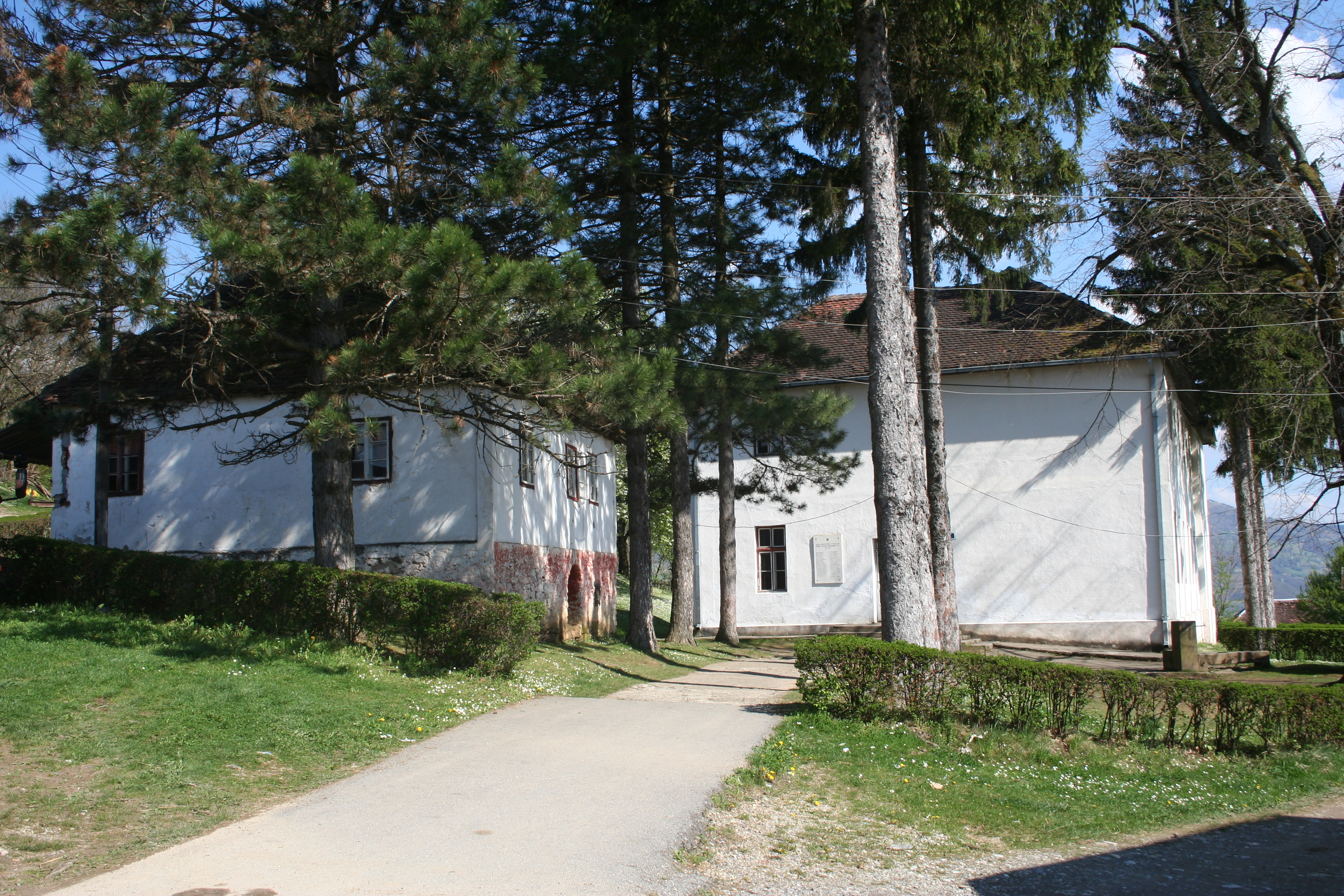 Zgrada škole, Donja Orovica